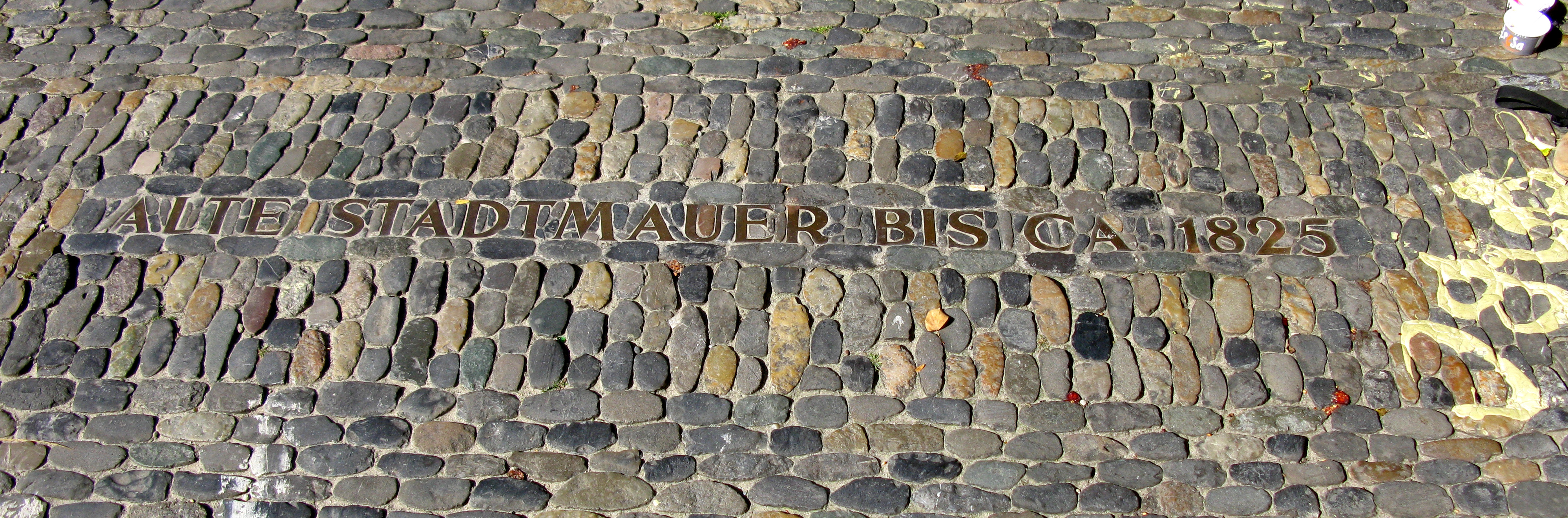 Pflasterinschrift am Augustinerplatz